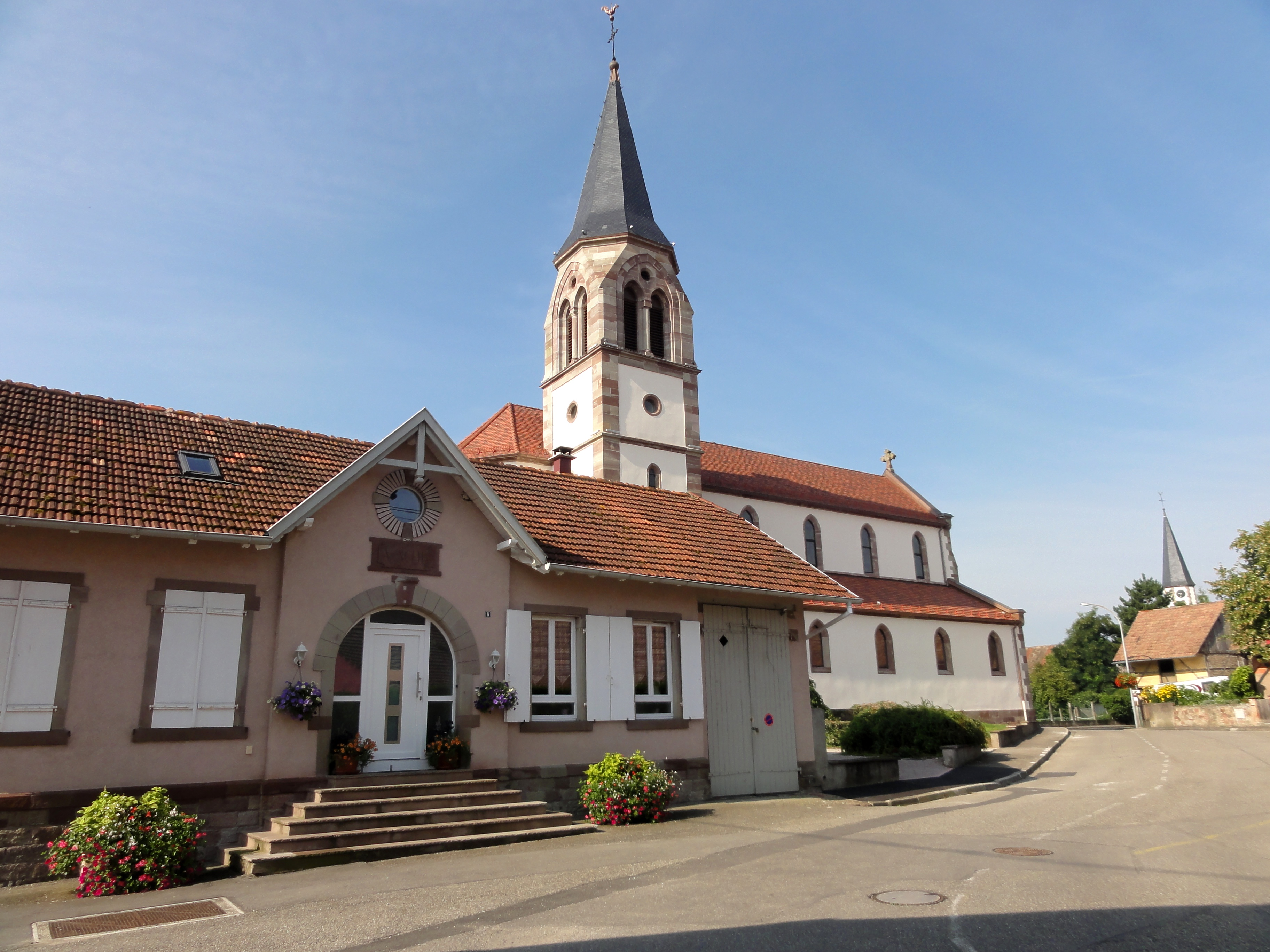 Alsace, Bas-Rhin, Église catholique Saint-Denis de Gerstheim (IA00023278). Église protestante Saint-Guillaume (XIXe)